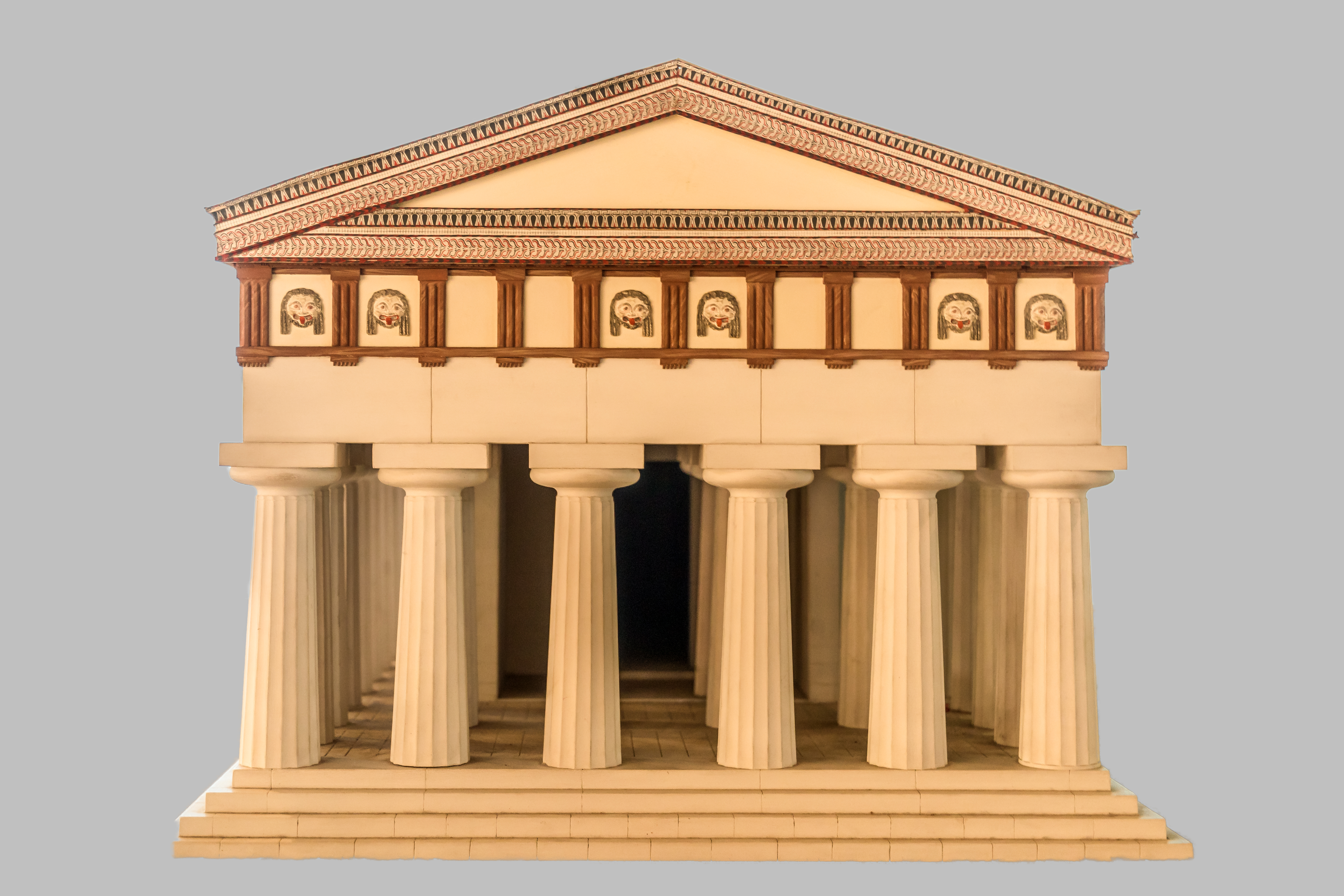 Moderne Modellrekonstruktion vom Apollontempel (Syrakus) im Museo Paolo Orsi